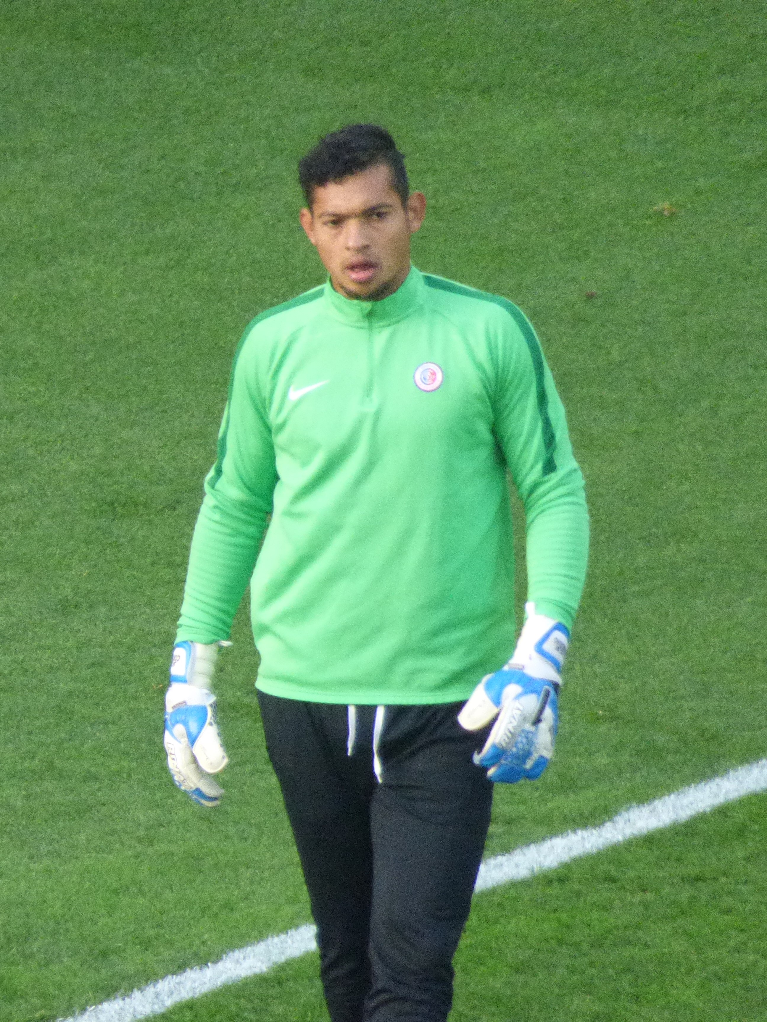 José Contreras avant le match RC Lens / LB Châteauroux, le 3 novembre 2018, comportant pour la treizième journée du championnat de France de football de Ligue 2, au Stade Bollaert-Delelis.